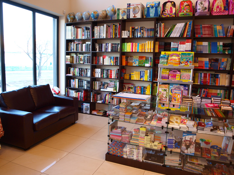 Nowoczesne księgarnie umożliwiają przejrzenie książek na wygodnej kanapie